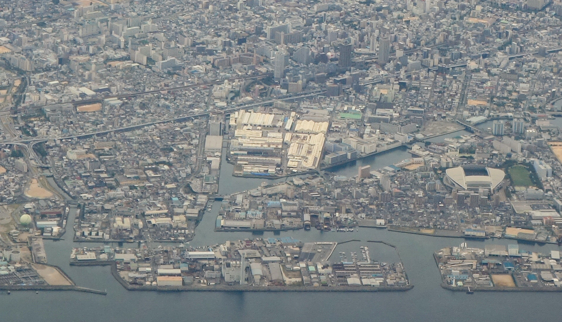 川崎重工業 兵庫工場（車輌カンパニー） （画面中央の白い建物群、2014年9月19日撮影、NH1713便（ANA））